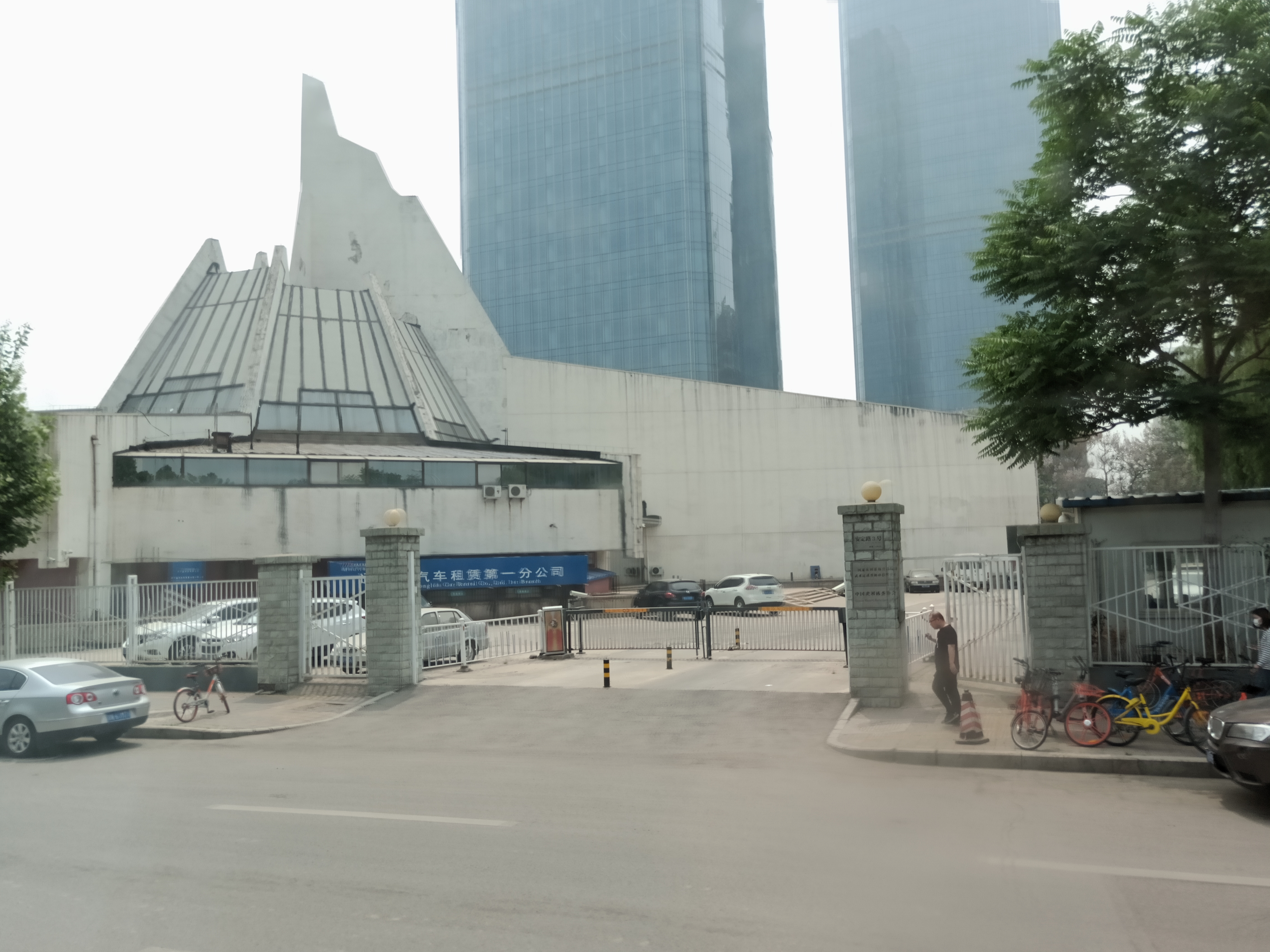 粵語: 中國體育博物館